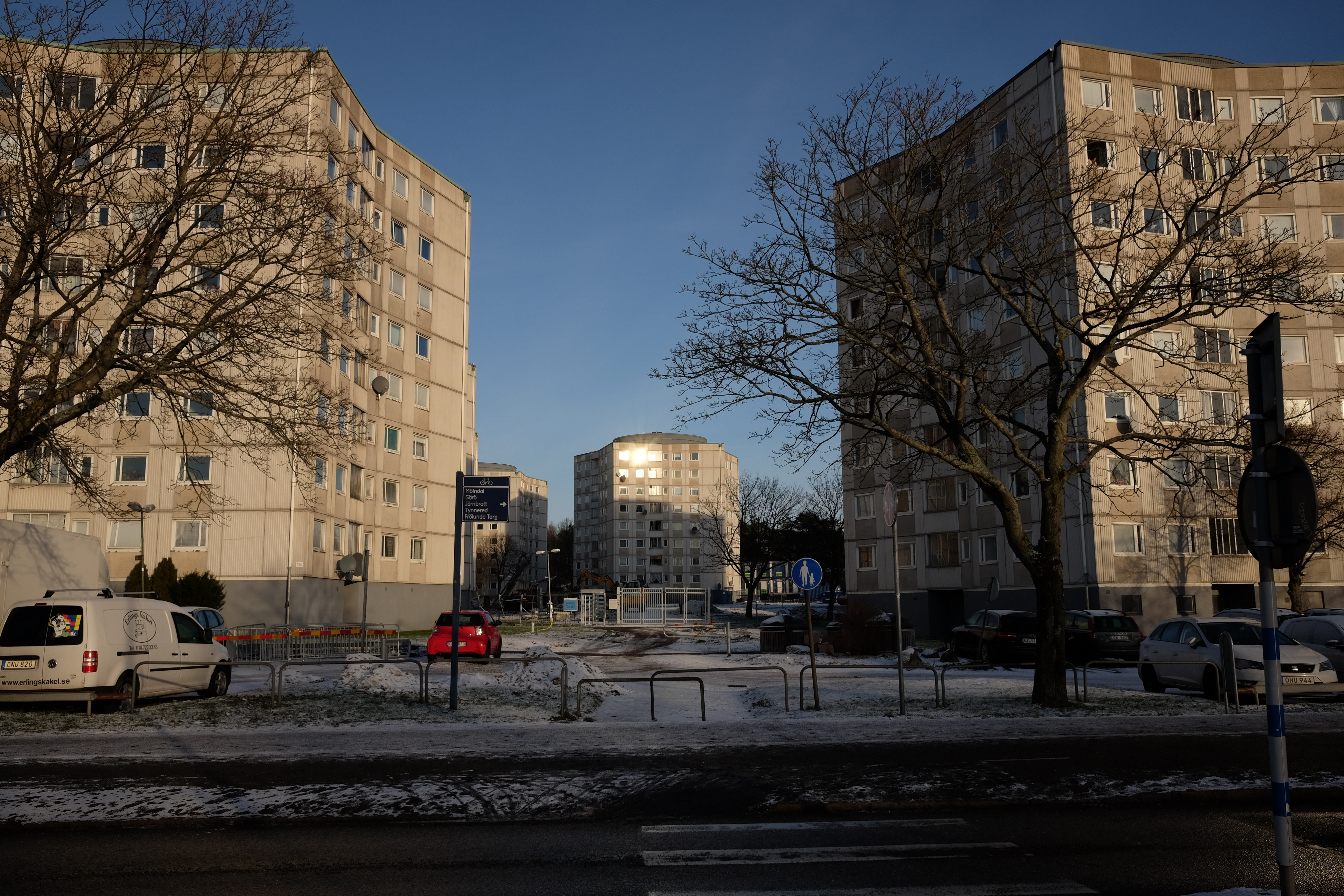 Stjärnhusen, Västra Frölunda, Göteborg.